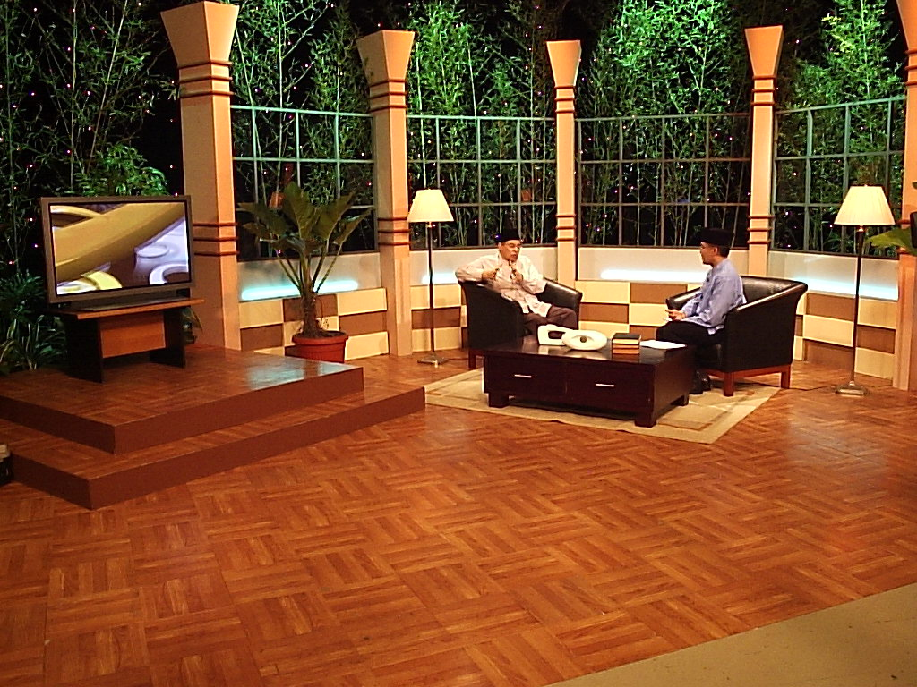 Rekaman Semesta Ayat dalam Hikmah Fajar dengan Presenter Wisnu Prayudha dan Narasumber M. Quraish Shihab (2005)